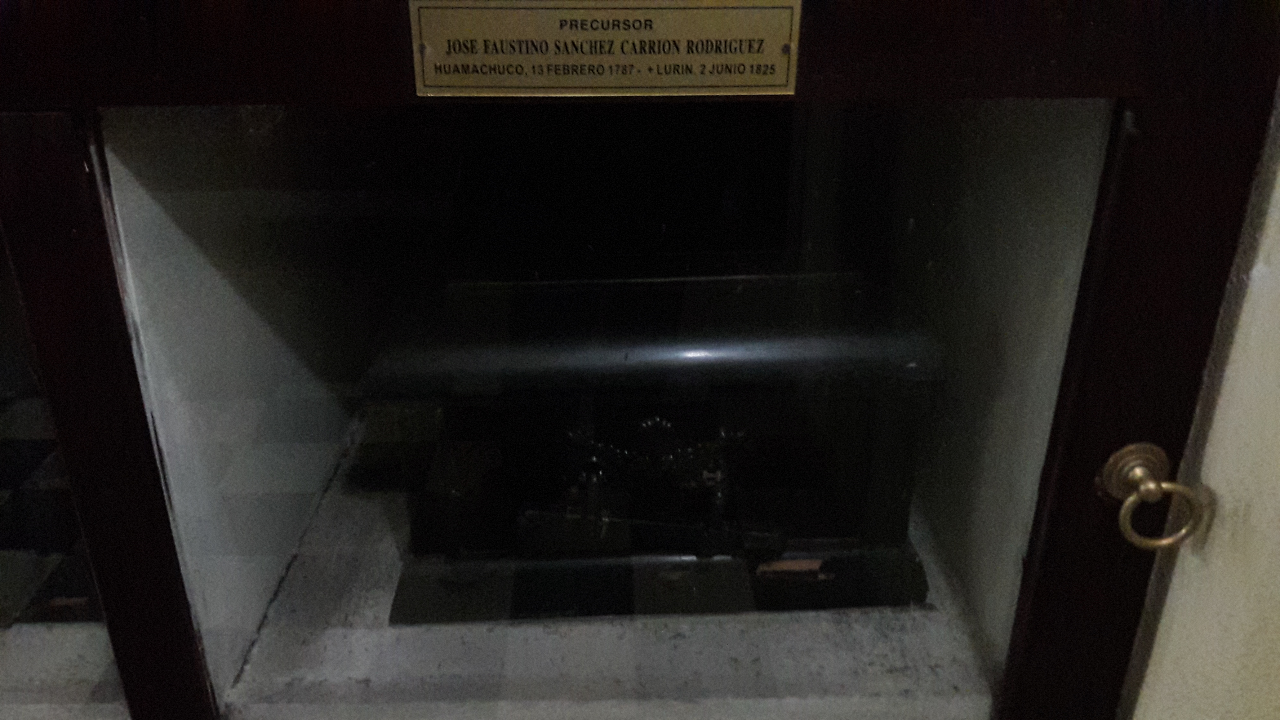 Tumba de José Faustino Sánchez Carrión